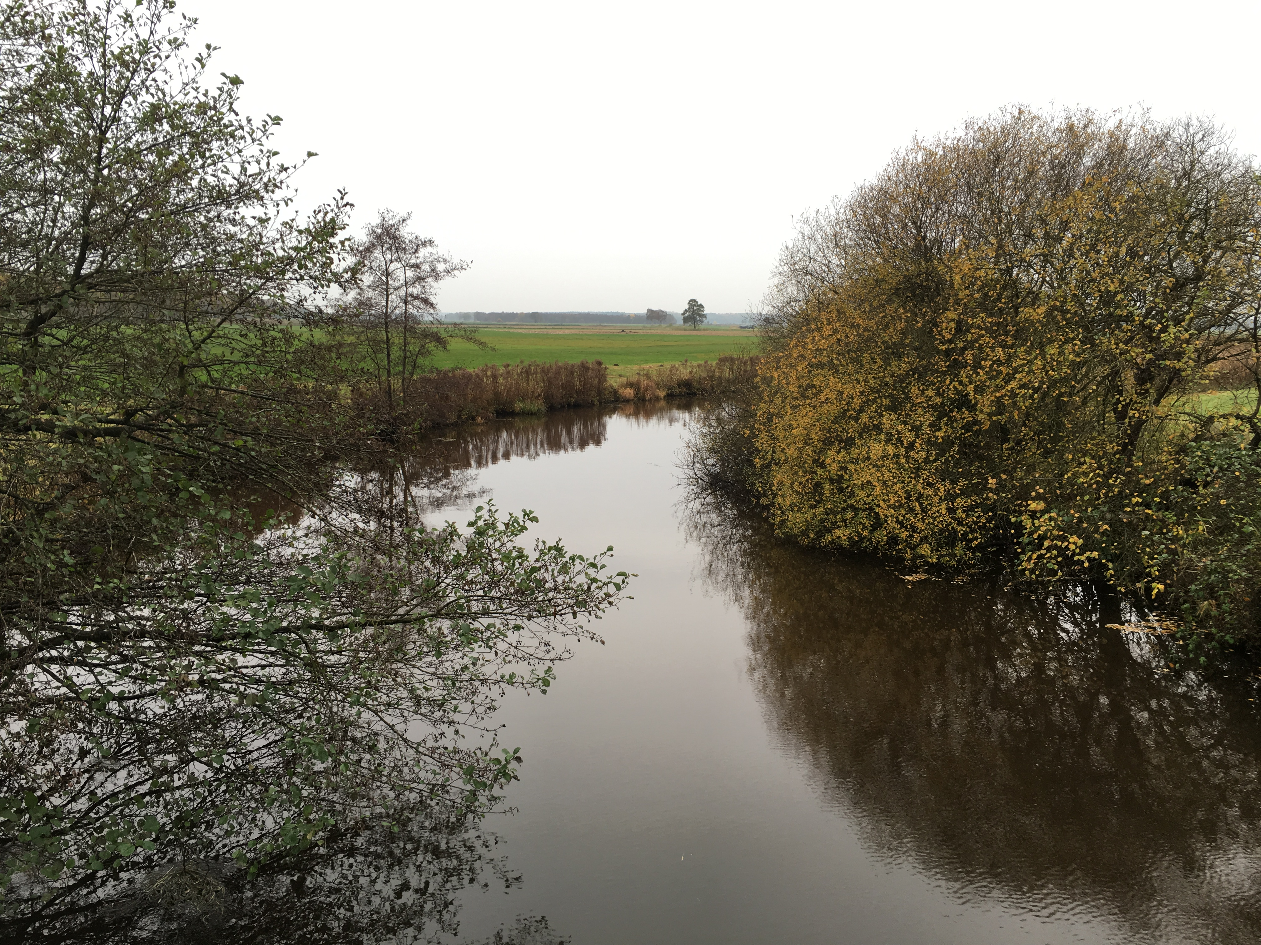 Meh bi Mehdörp (von de Brügg von de K 35 ut keken)